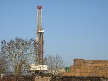 puit de pétrole à Saint Martin de Bossenay Aube France